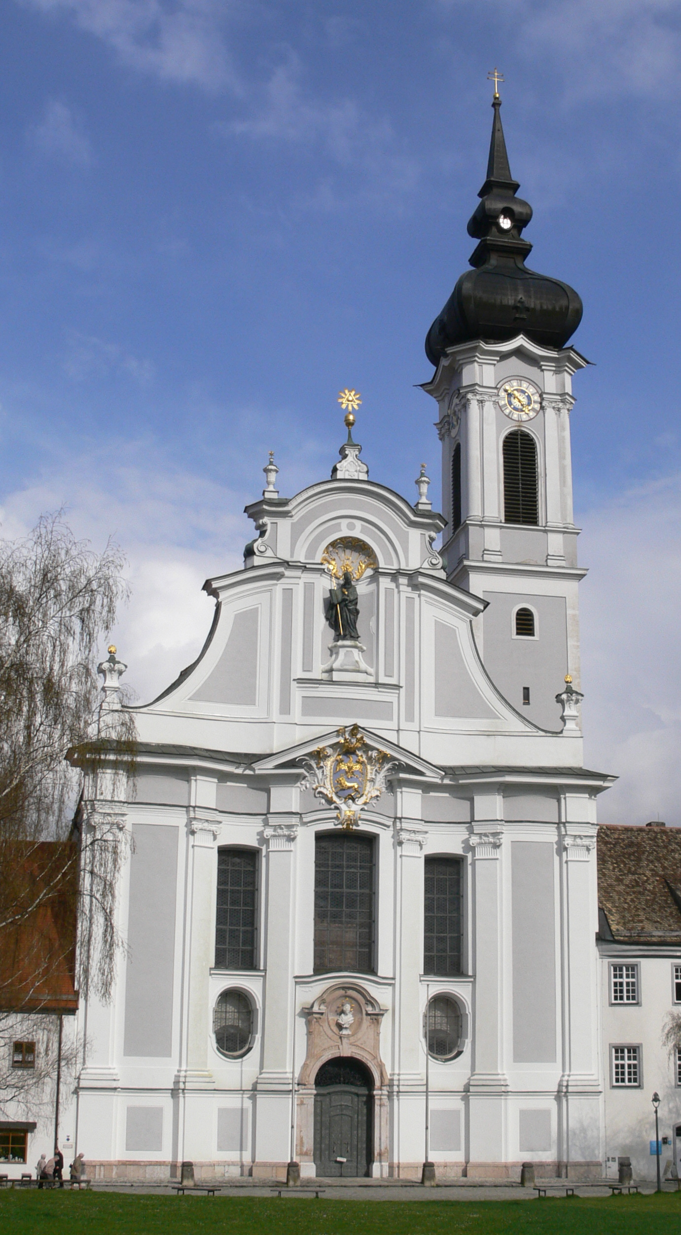 Dießen am Ammersee, Westfassade des Marienmünsters von Johann Michael Fischer